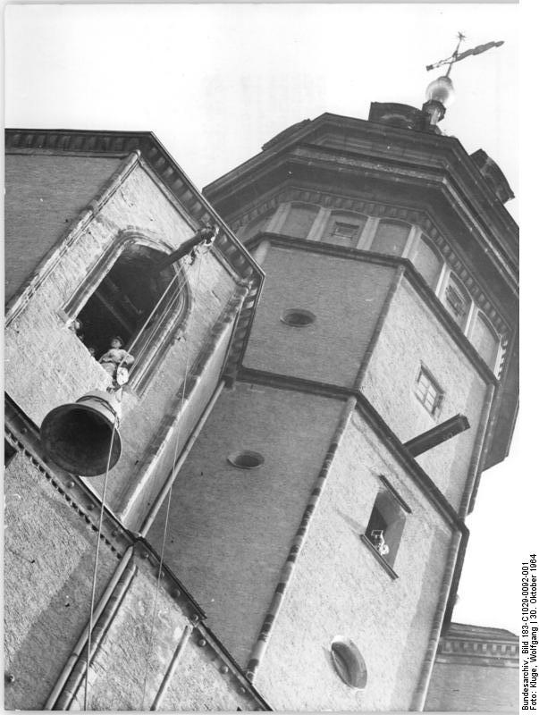 Leipzig, Nikolaikirche, Glocke wird aufgezogen Zentralbild Kluge 30.10.1964 Neue Glocken für Leipziger Kirchen Sechs Glocken mit einem Gesamtgewicht von 7800 kg stellte die Glockengießerei Schilling & Söhne in Apolda für Leipzier Kirchen her. UBz: Hier wird eine der Glocken an der Nikolaikirche aufgezogen.